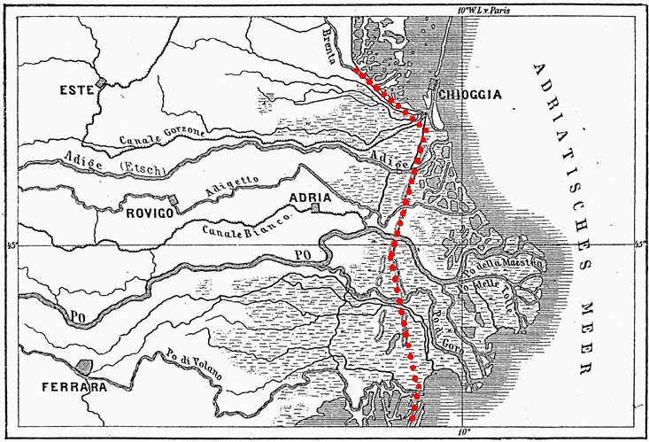 Delta des Po - Limites des terres en 1600